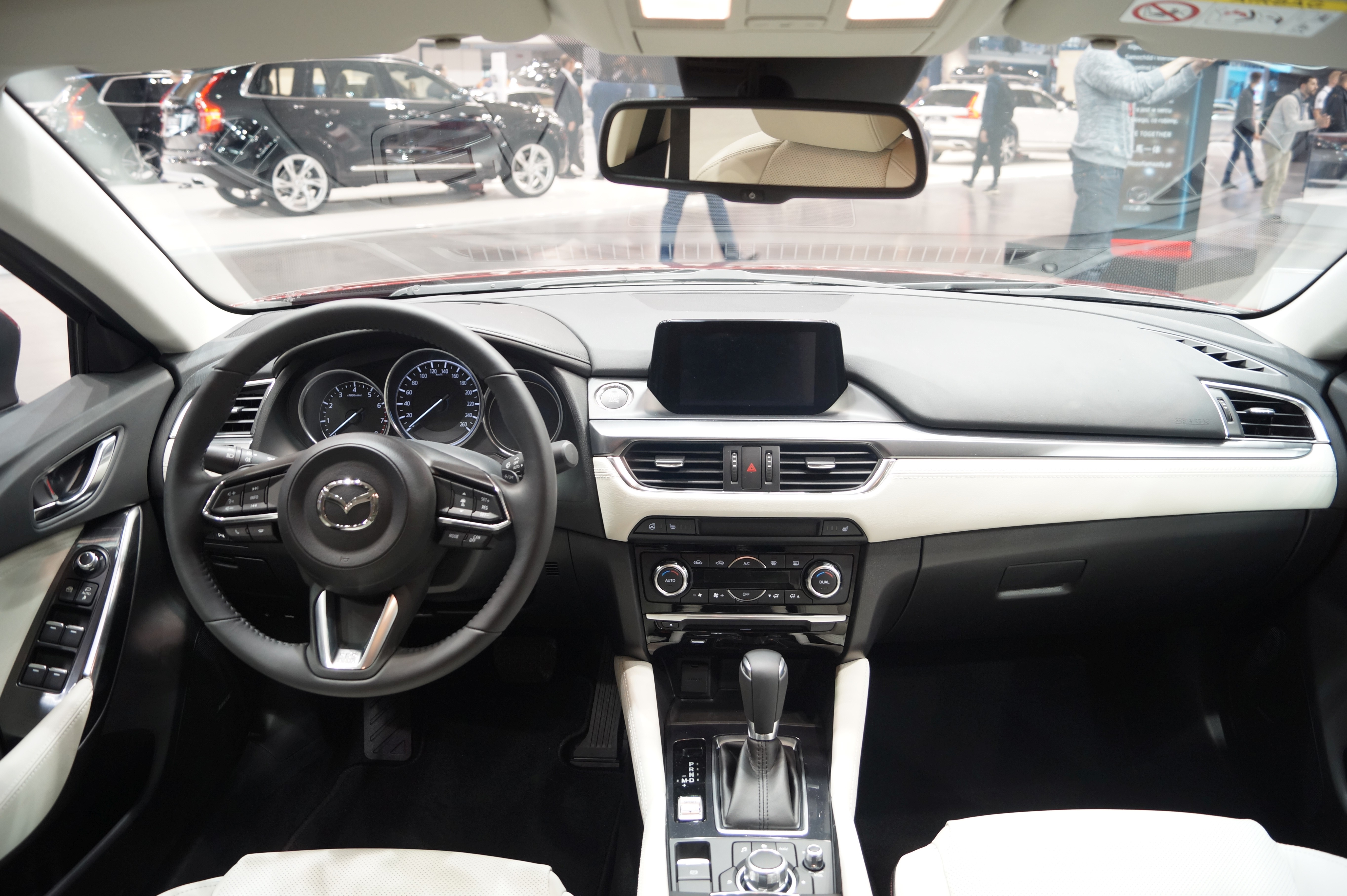 Wnętrze Mazdy6 na Motor Show Poznań 2017.